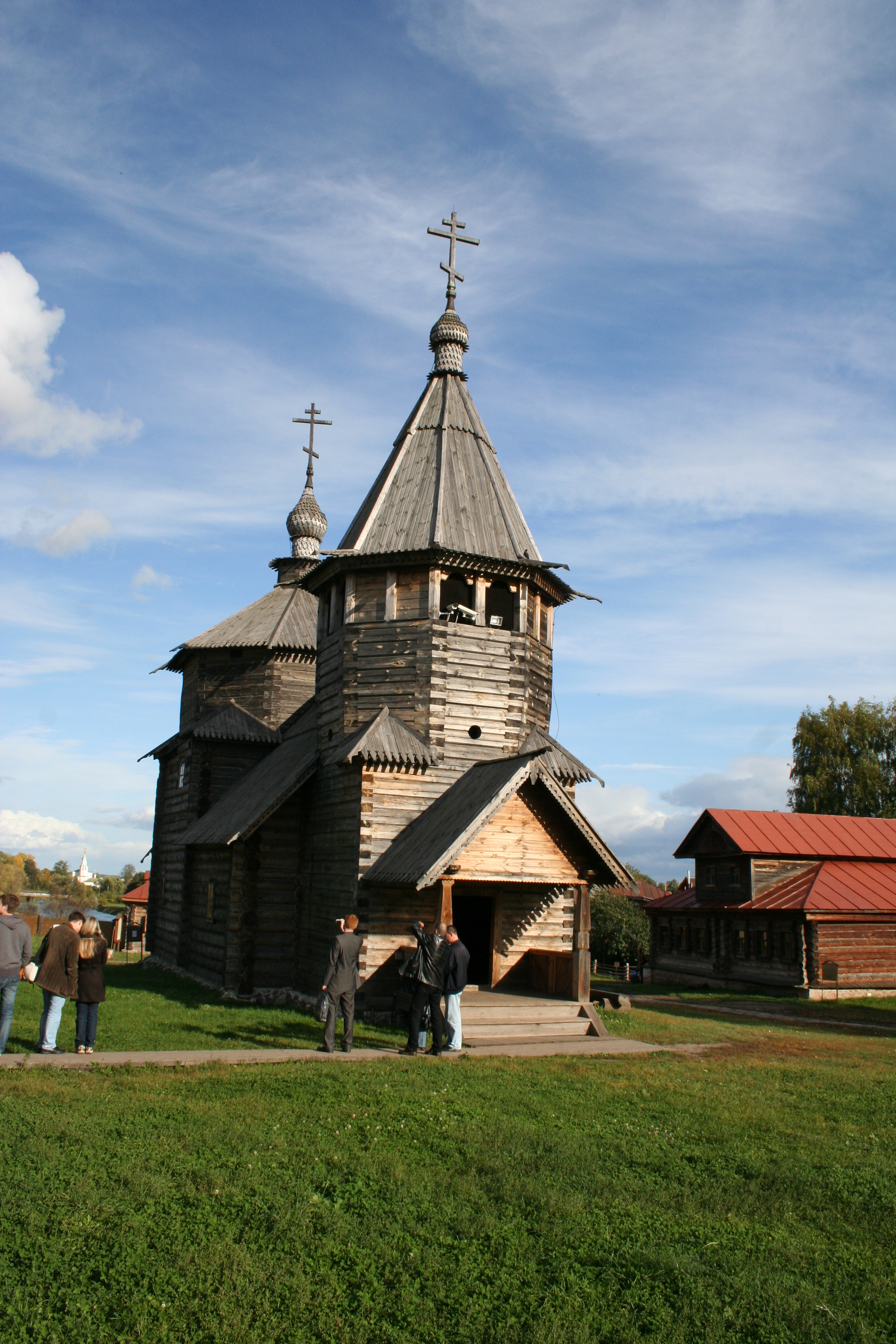 Воскресенская церковь в Суздальском музее деревянного зодчества